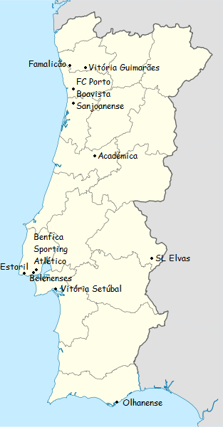 carte des clubs participants du championnat du portugal de football de premiere division 1946-1947